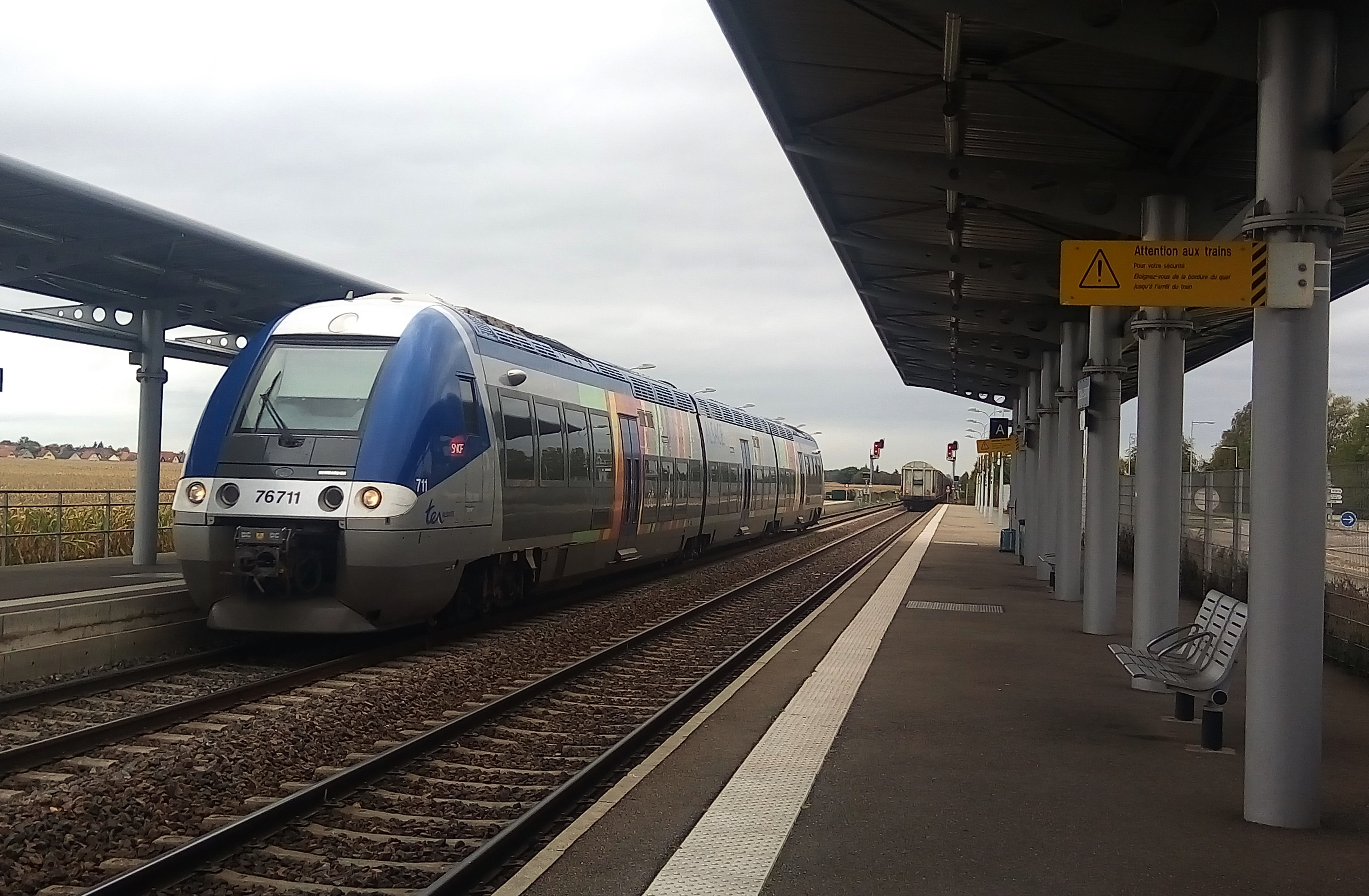 TER arrivant et train de Fret quittant la gare d'Entzheim-Aéroport